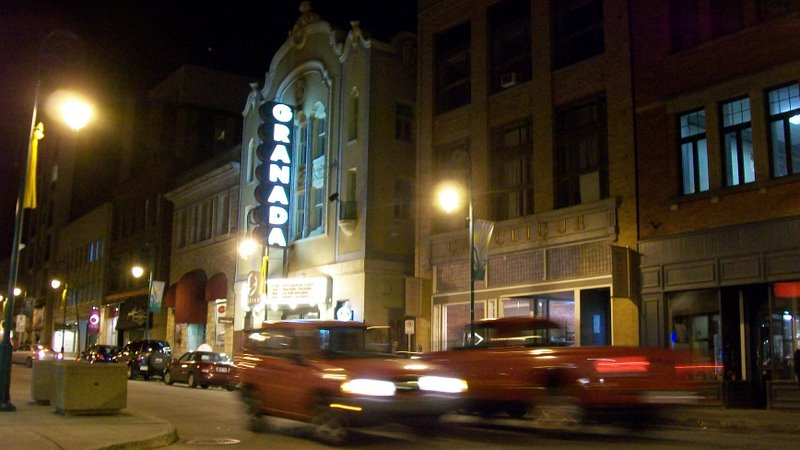 Rue Wellington